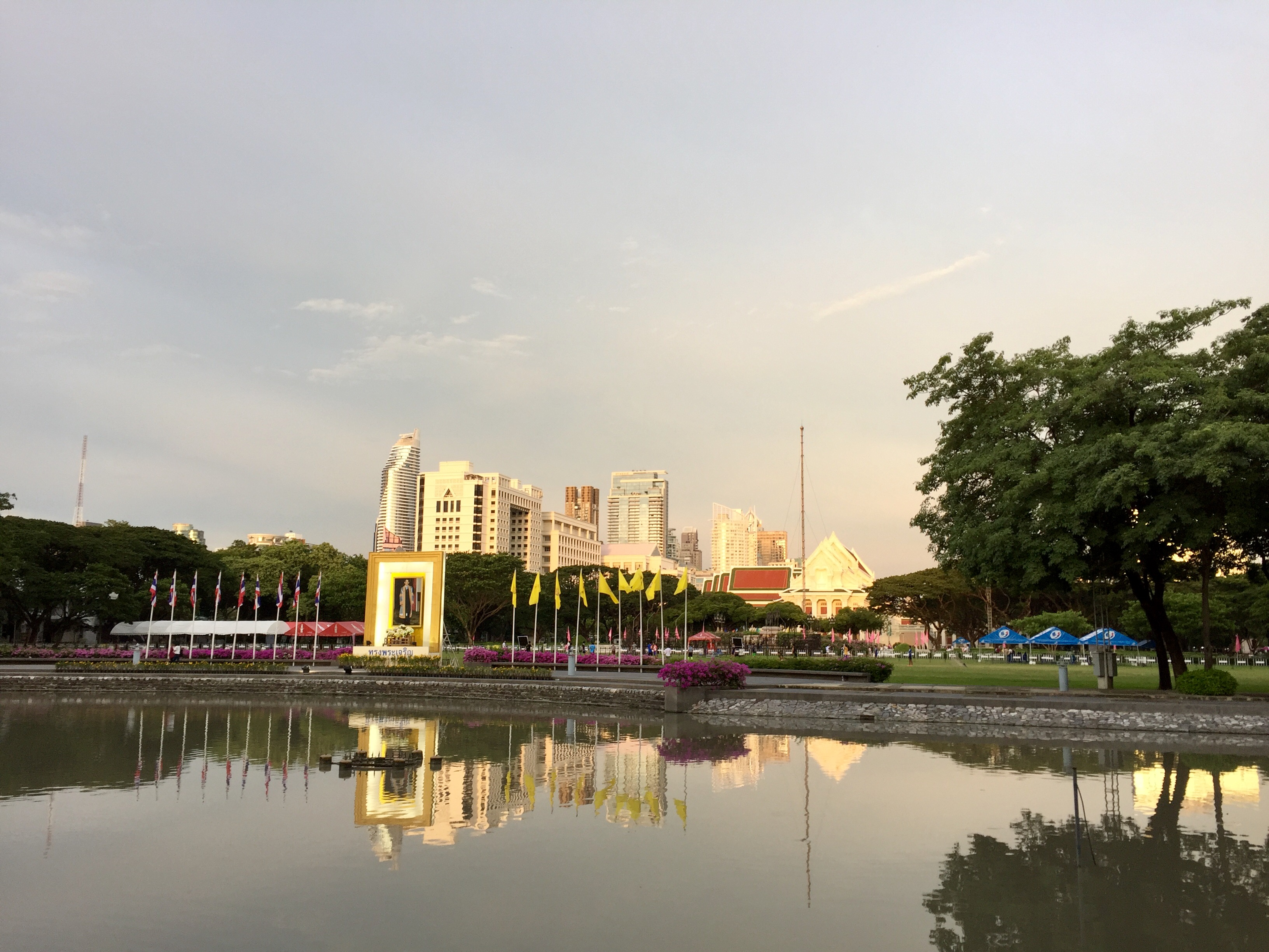 พื้นที่หลักฝั่งตะวันออกของถนนพญาไทของจุฬาลงกรณ์มหาวิทยาลัย